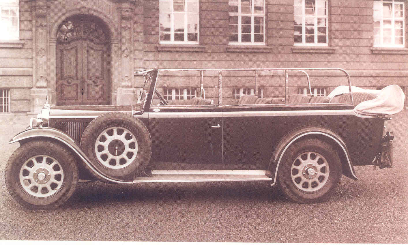 Chronik2 1936 10-sitzer